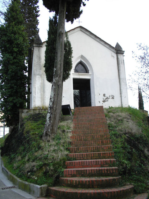 Peccioli, Legoli, Cappella santa Caterina, affreschi Gozzoli